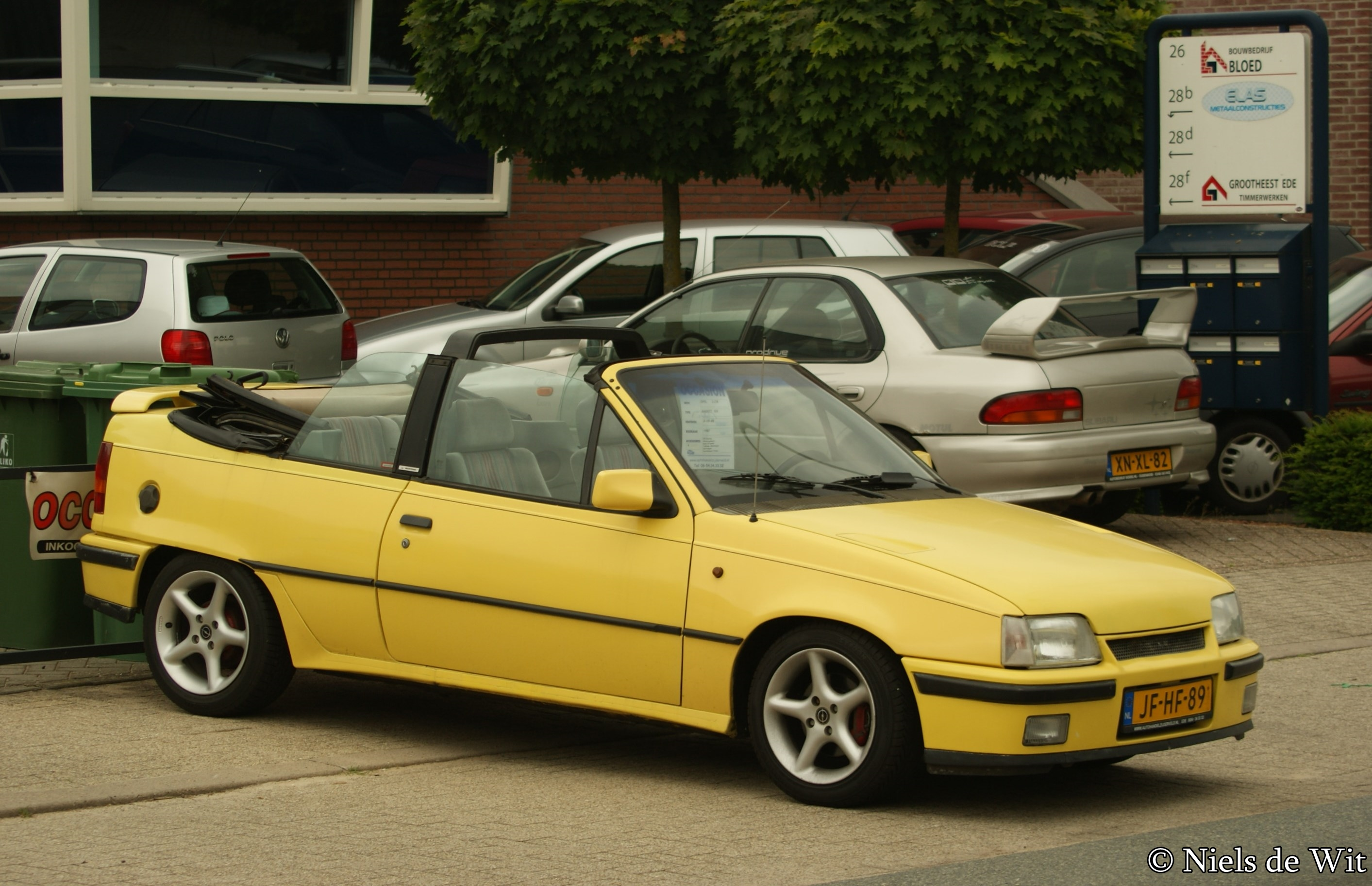 JF-HF-89